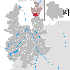 Korbußen in Thuringia - District Greiz